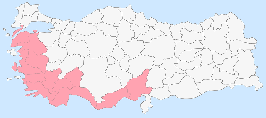 Tahtacıların Yerleşim İlleri